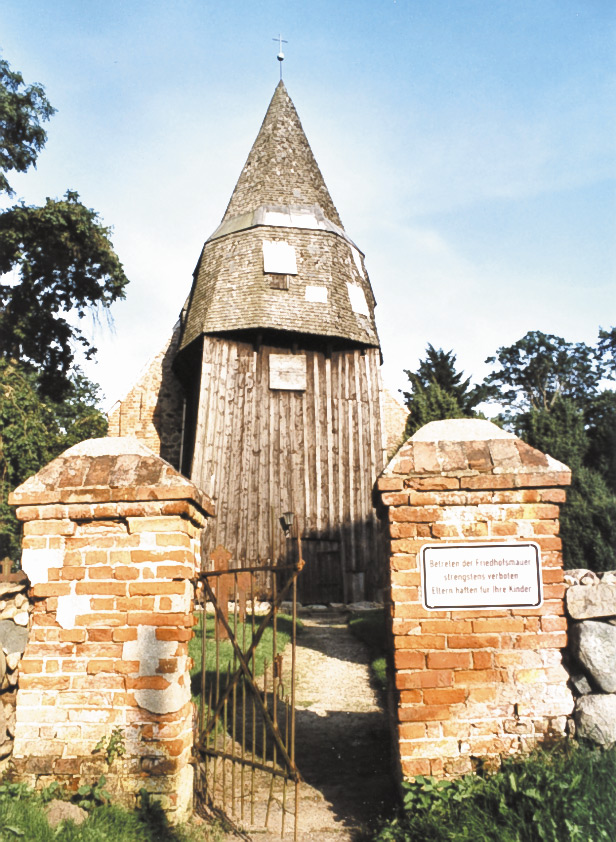 Dorfkirche Tribohm, Turm von Westen